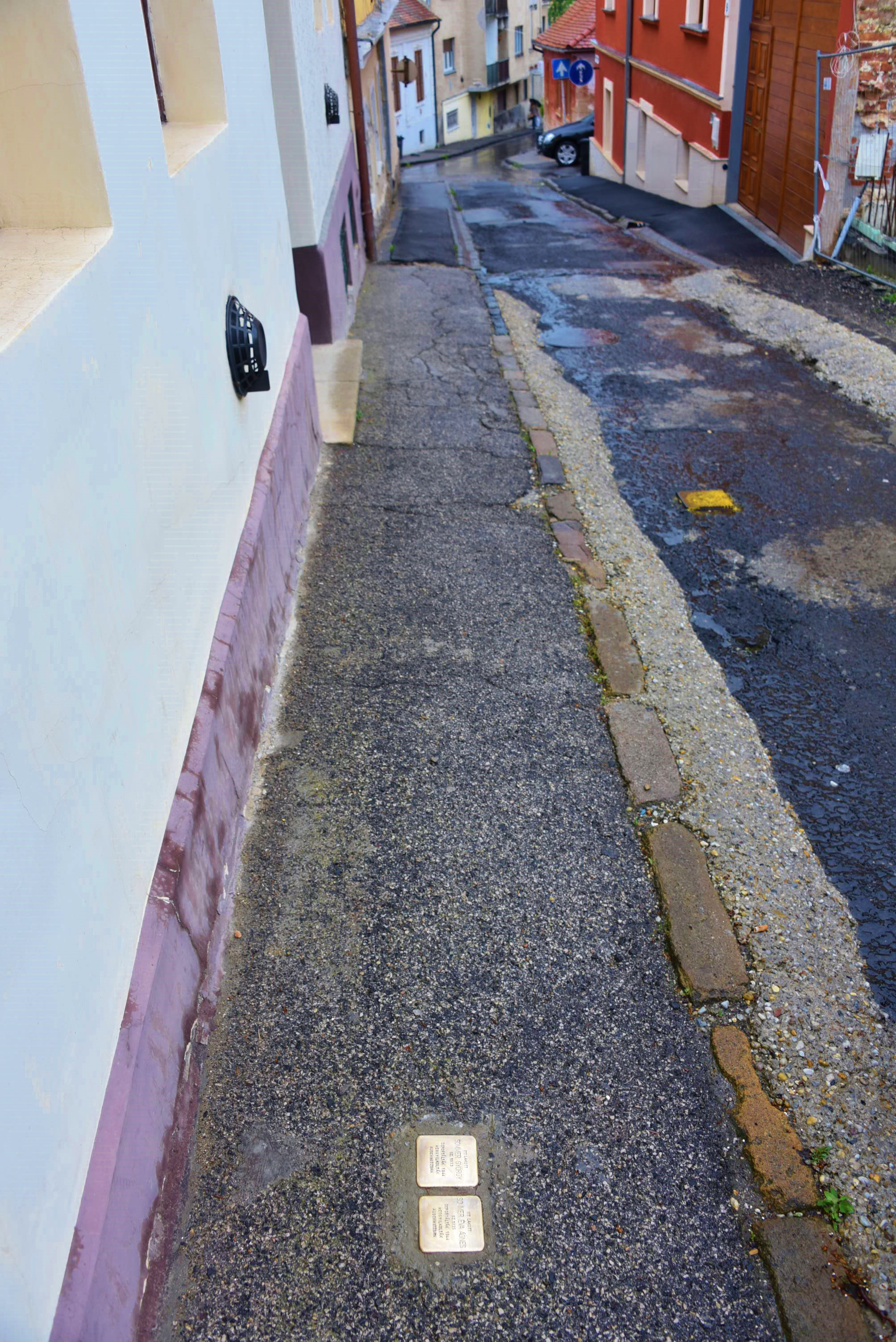 Stolpersteine in Pecs